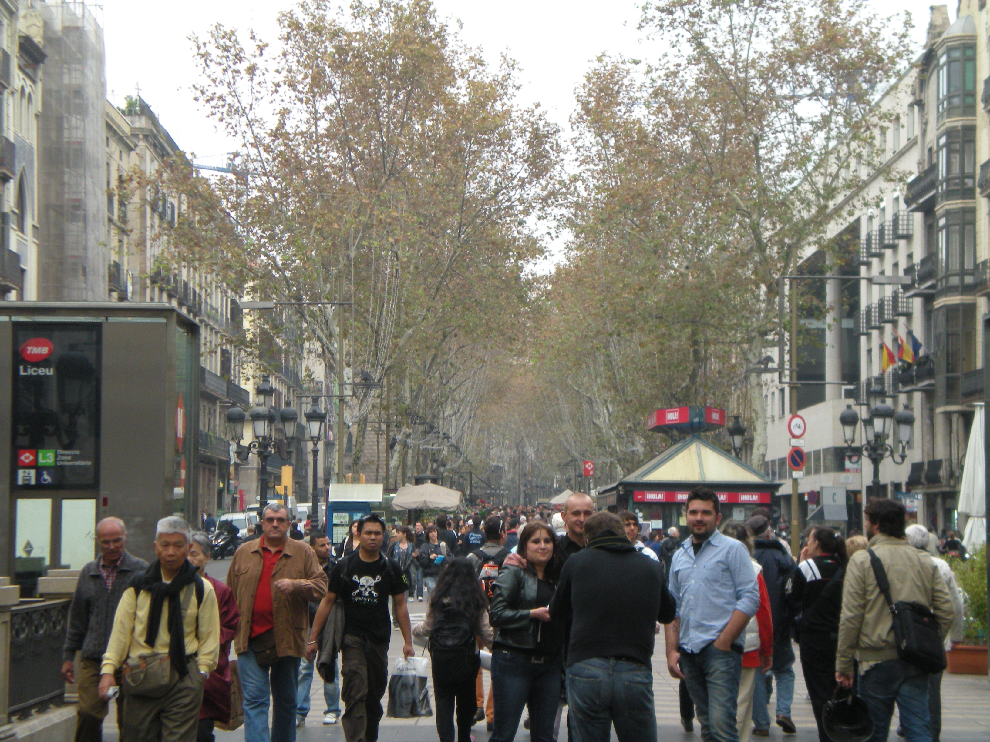 שדרת הרמבלה